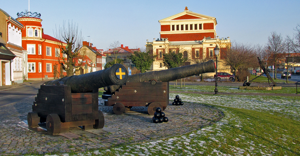 Kanonerna vid Skansgatan och Ystads Stadsteater i bakgrunden 5 feb 2015.